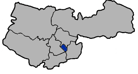 臺中市中區。